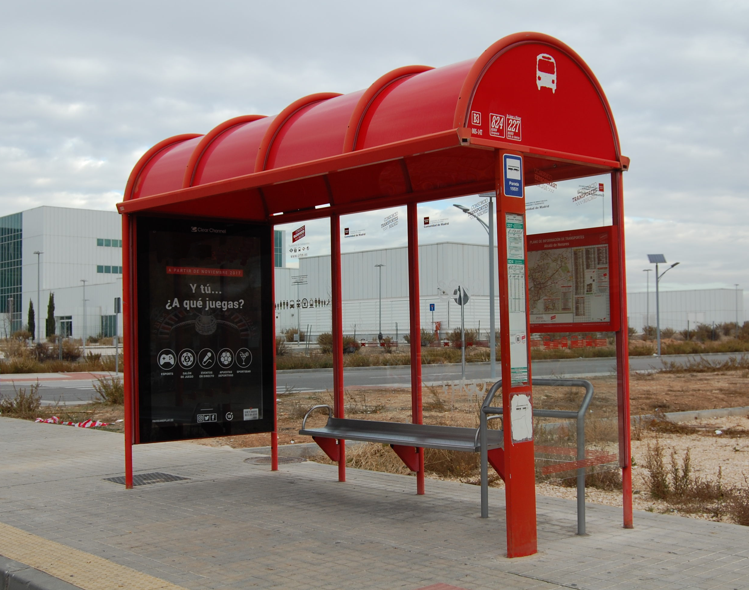 Marquesina de una parada de autobús del transporte urbano e interurbano de Alcalá de Henares (Comunidad de Madrid - España), situada en el Campus Científico-tecnológico de la Universidad de Alcalá. Parada 15531, utilizada por la línea urbana L2, y las interurbanas 227 y 824.